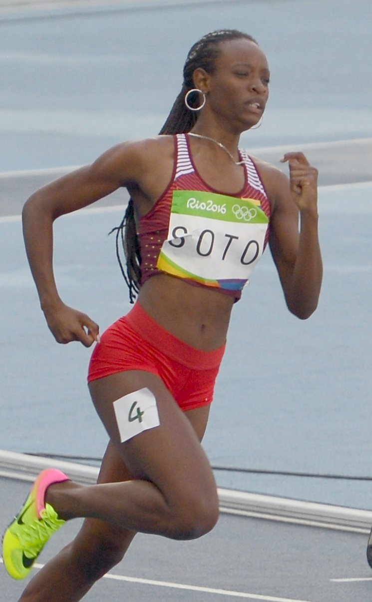 Nercely Desirée Soto dans sa série du 200m féminin des jeux olympique de Rio, 2016